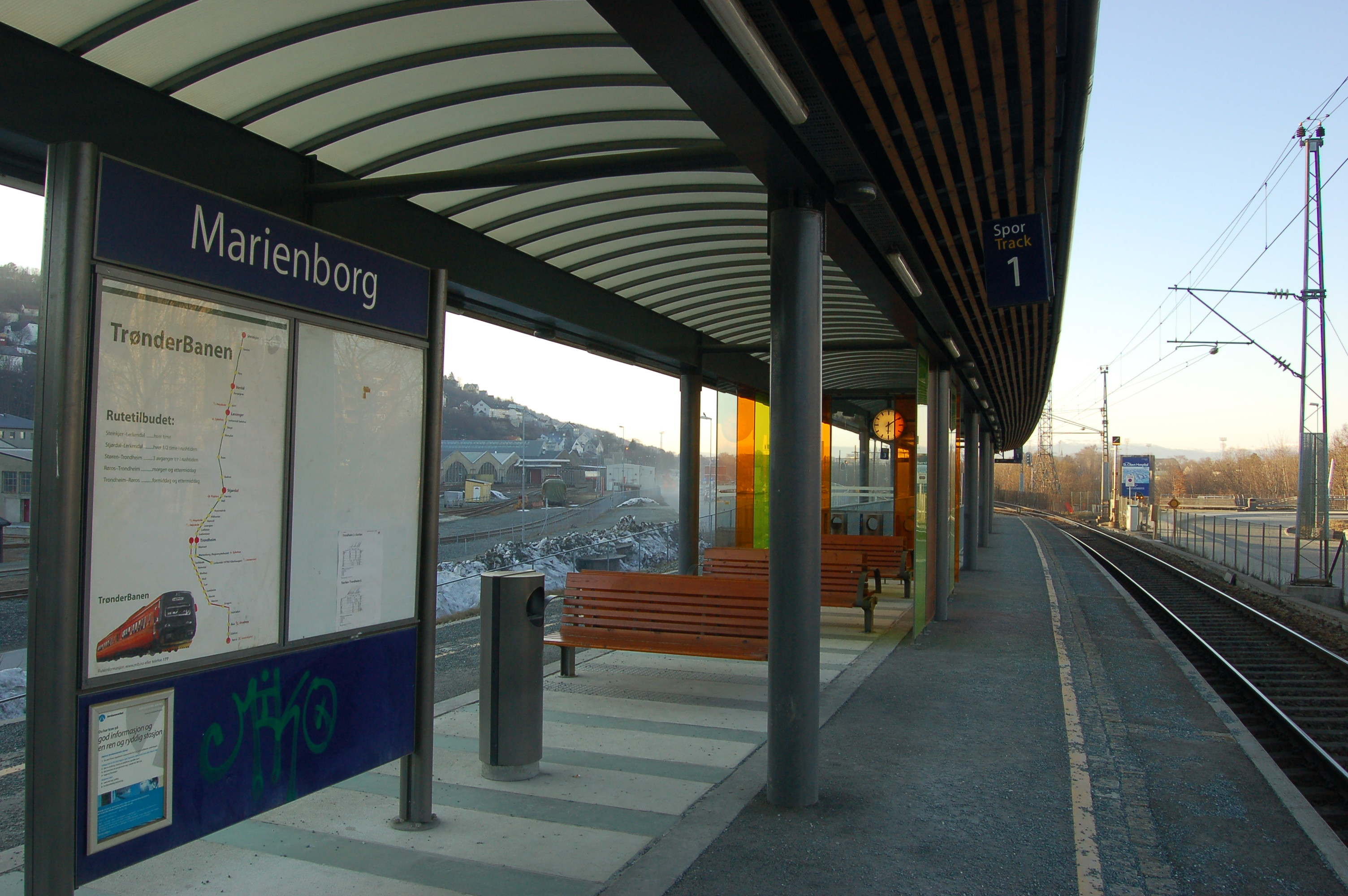 Marienborg Station on Dovrebanen, in Trondheim, Norway